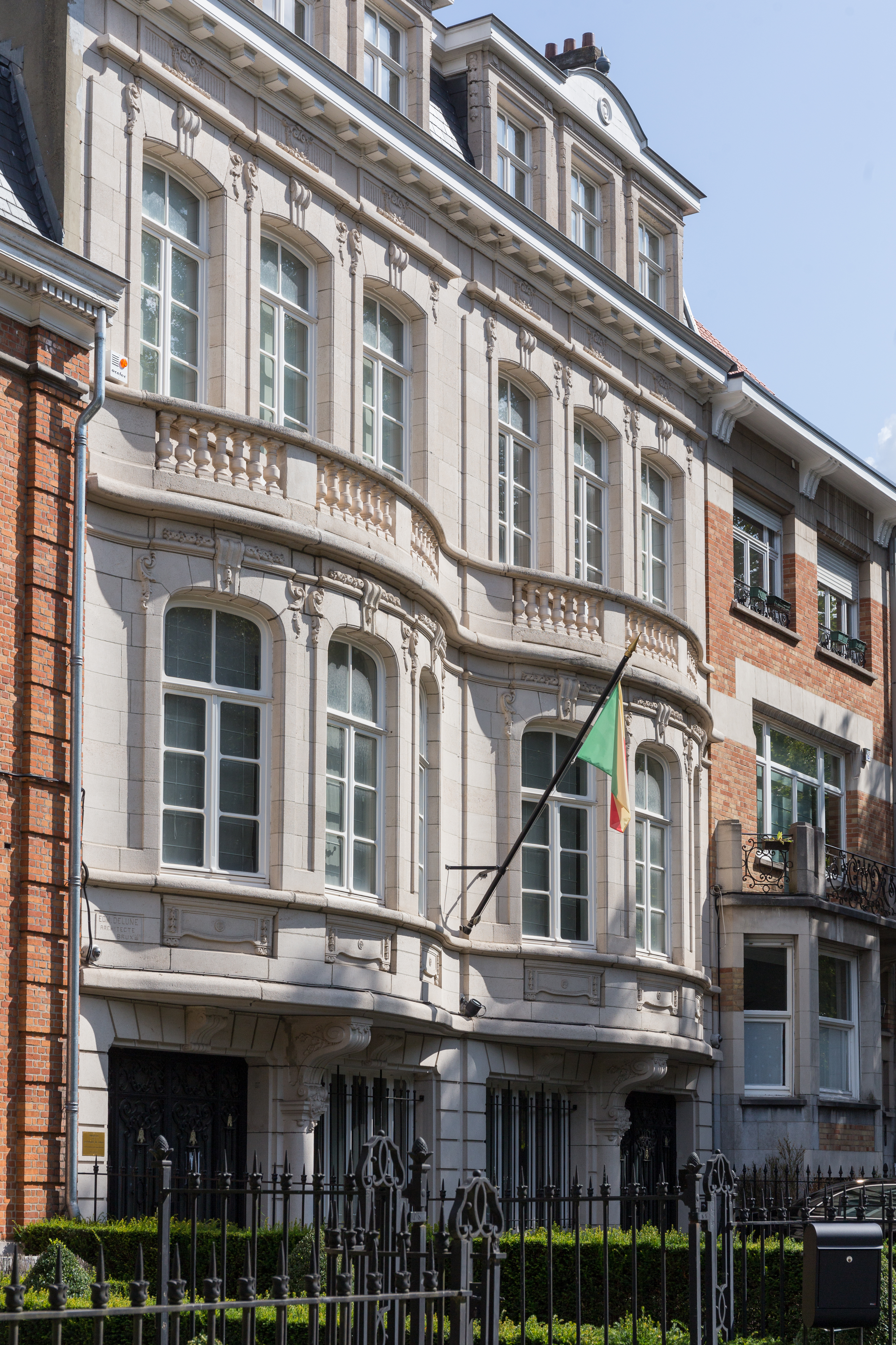 Ambassade du Congo en Belgique, avenue Franklin Roosevelt 16-18 à Bruxelles.